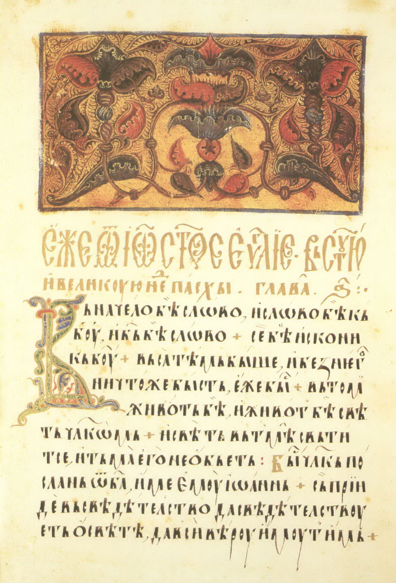 Заставка, инициал буква В (веди); Балканы. Сербия. Печь; XV в.; памятник: Радославово Евангелие 1428-1429 гг., сербский извод, полууст.; местонахождение: Сербия. Белград. Национальная Библиотека Сербии